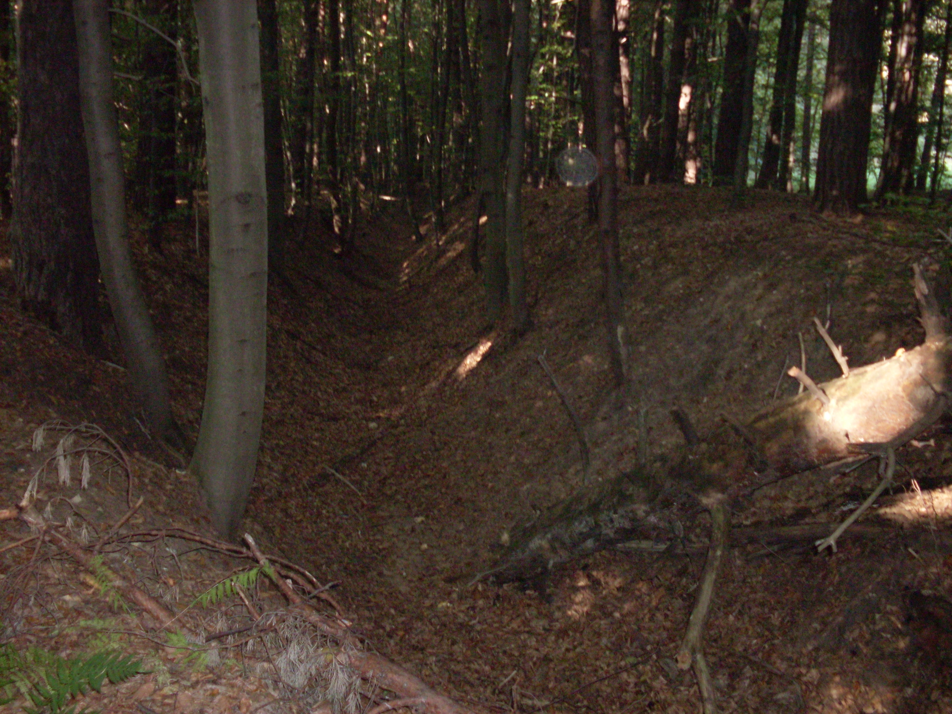 Początek Doliny Borowca